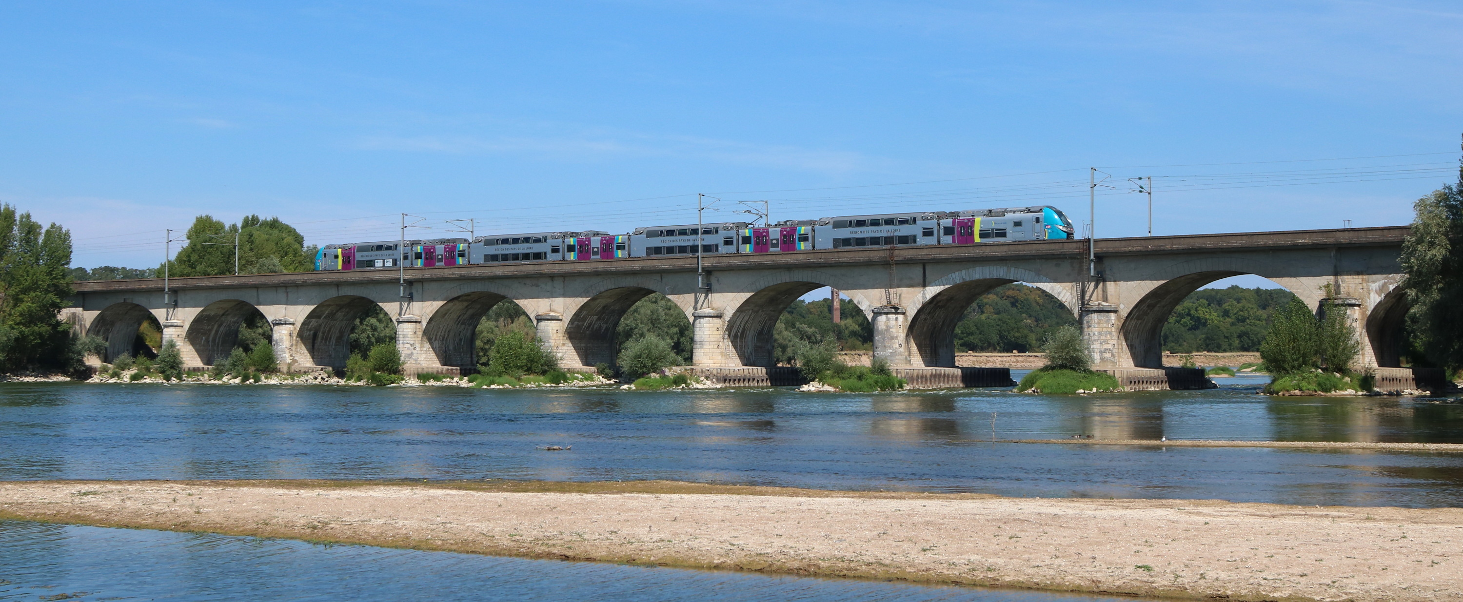 La rame Regio2N « Jumbo vélo » en livrée Pays de la Loire franchi le viaduc de Cinq-Mars assurant le TER 200 Interloire n° 860005 (Orléans 11h27 - Nantes 14h32).